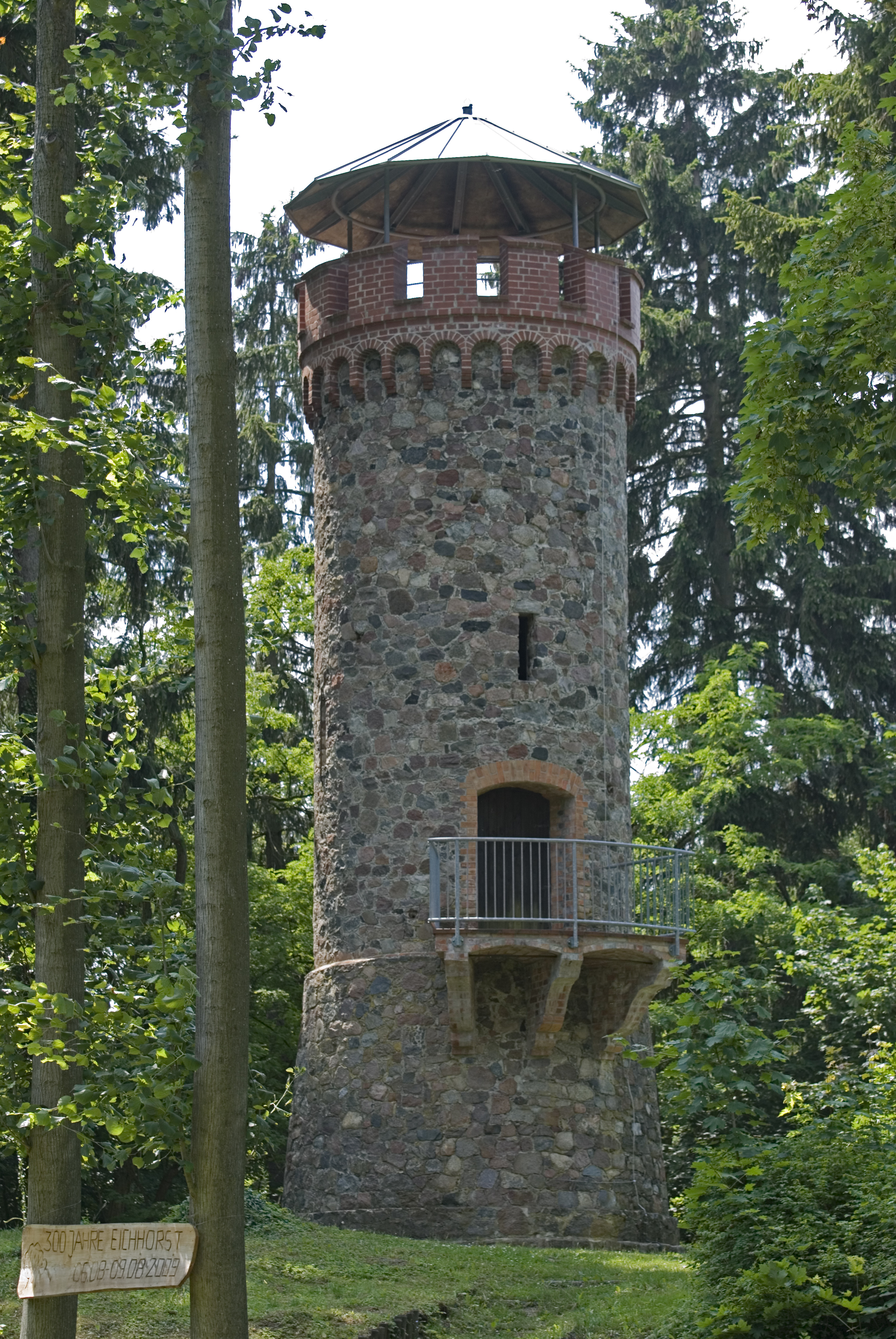 Askanierturm am Werbellinsee